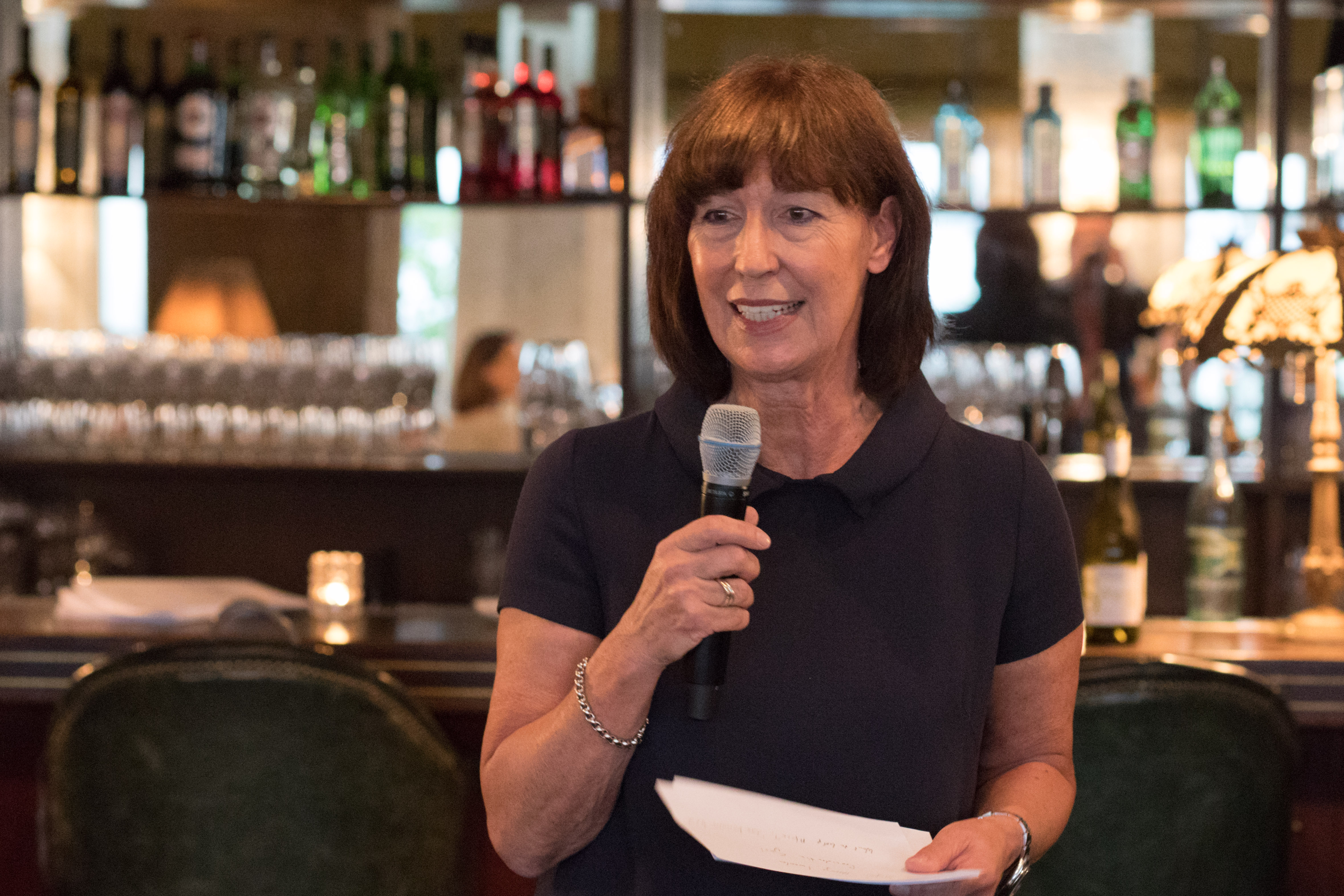 Ingrid Hamm bei der Moderation der Veranstaltung "Moving Rwanda" in Berlin